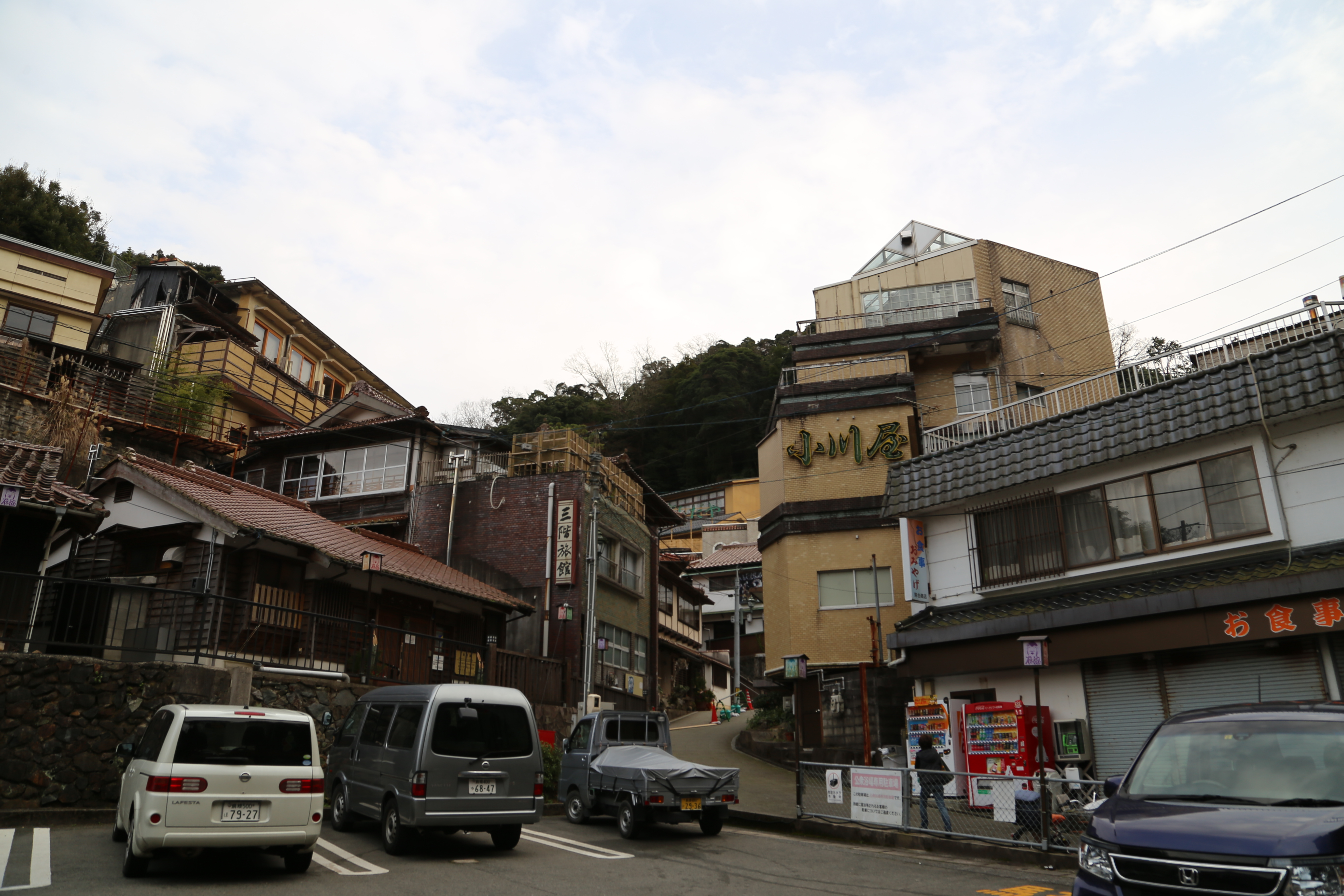 島根県江津市の有福温泉の正面口